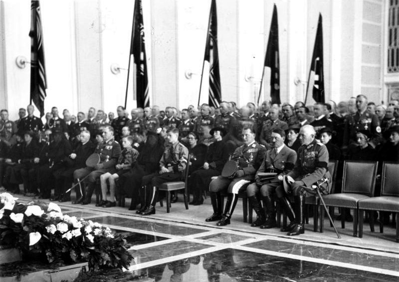 Trauerfeier für den Chef des Generalstabes der Luftwaffe Generalleutnant Wever im Ehrenhof des Reichsluftfahrtministeriums. Während der Trauerfeier. Von rechts nach links: Der Oberbefehlshaber der Wehrmacht Generalfeldmarschall von Blomberg, der Führer und der Oberbefehlshaber der Luftwaffe Generaloberst Göring daneben die Angehörigen.